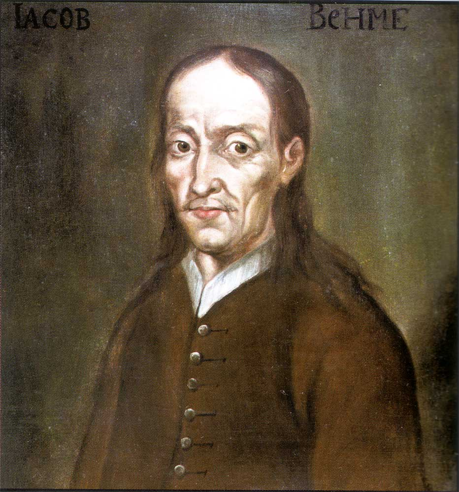 Posthumes Bildnis Jakob Böhme (1575–1624); Portrait von Gottlob Glymann ohne Jahr